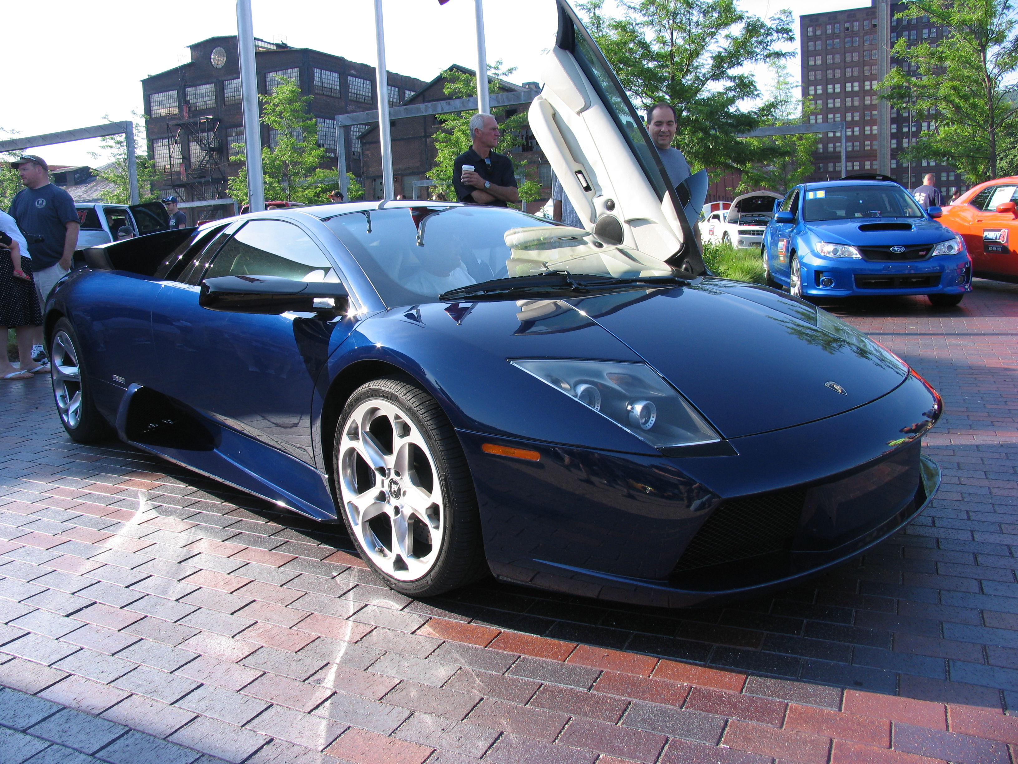 Lamborghini Murcielago